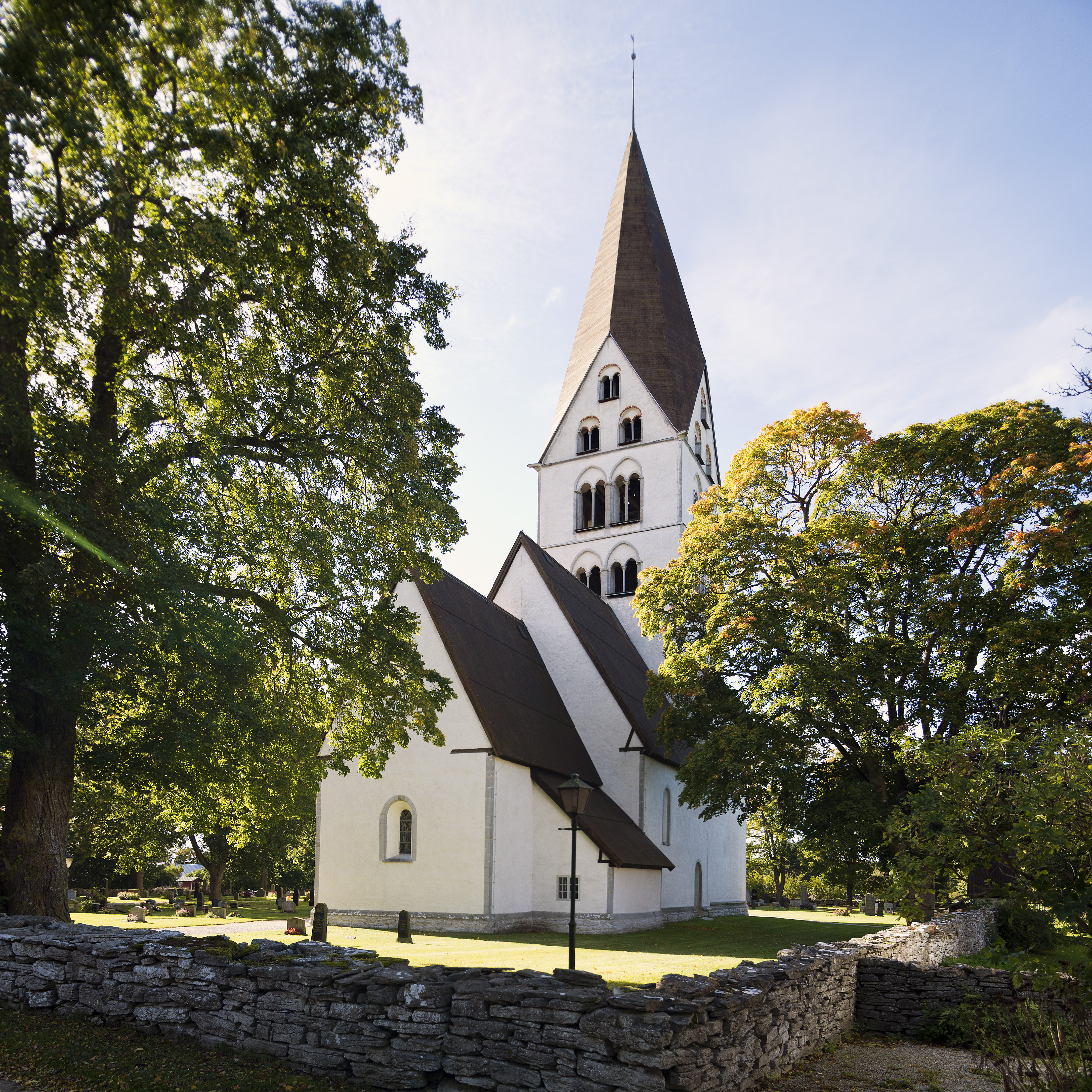 Stenkyrka kyrka, Gotland